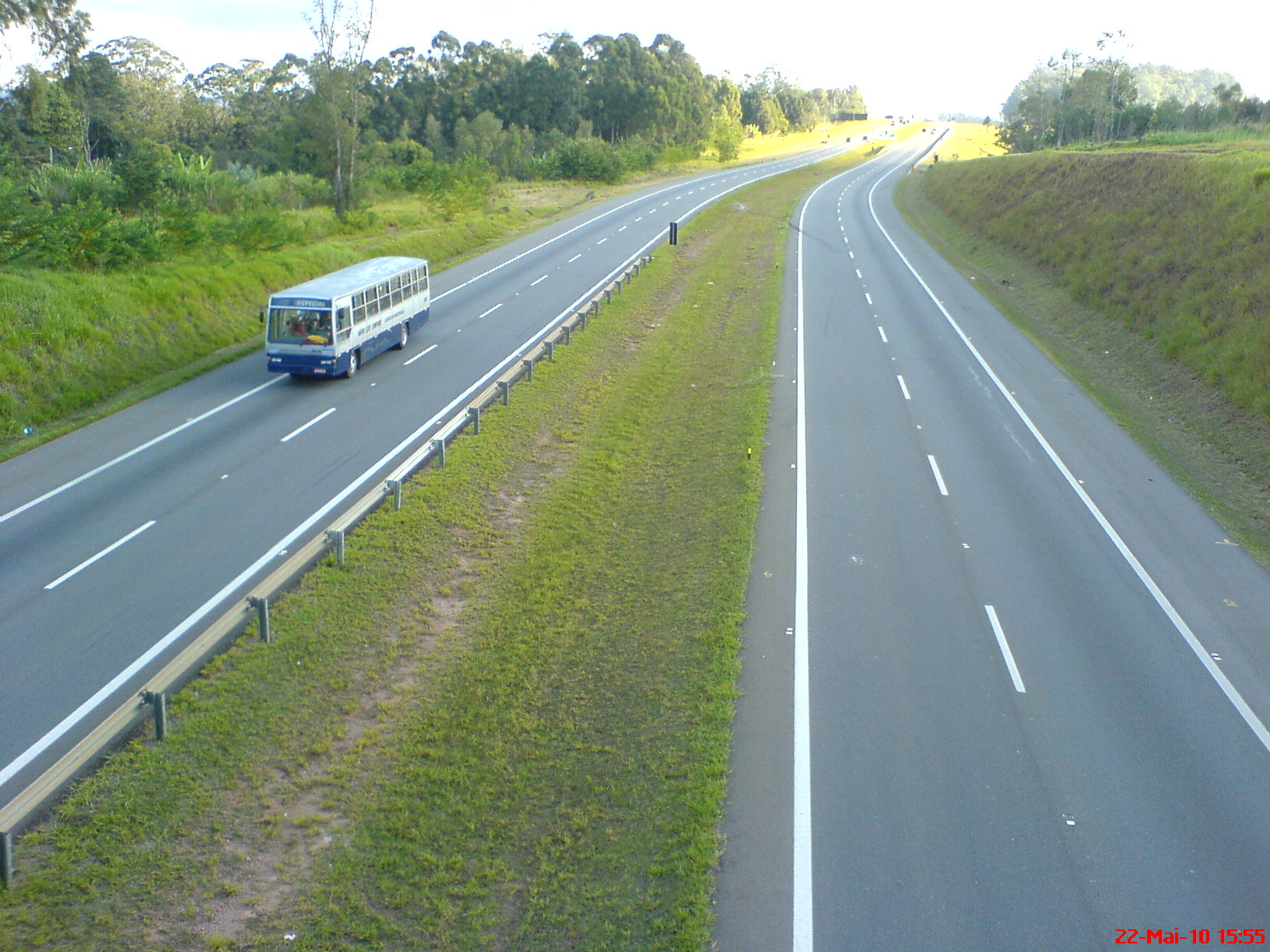 Anel Viário Magalhaes Teixeira